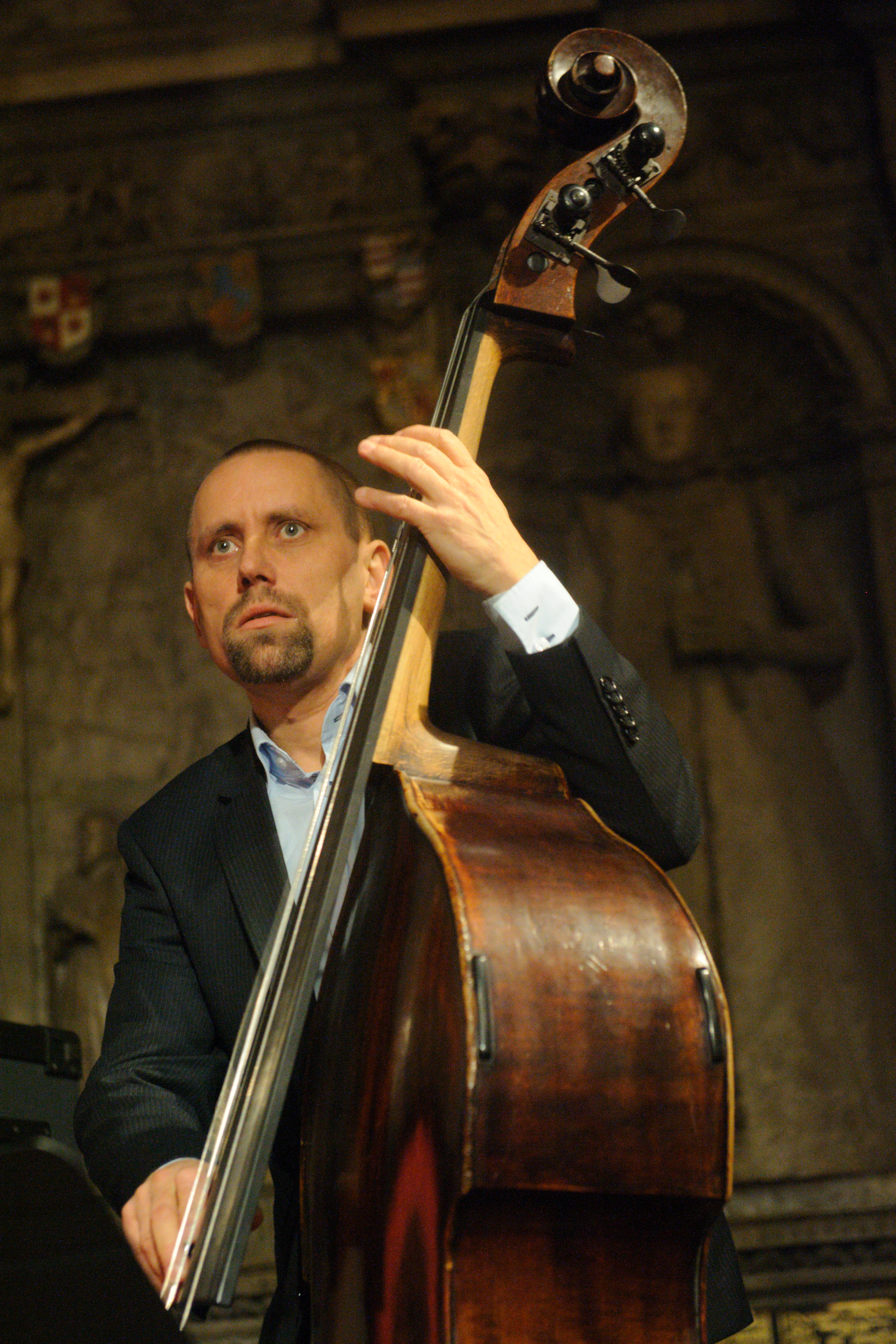 Joscha Oetz bei einem Konzert mit seinem Quintett in der Stadtkirche Darmstadt am 1. Februar 2015